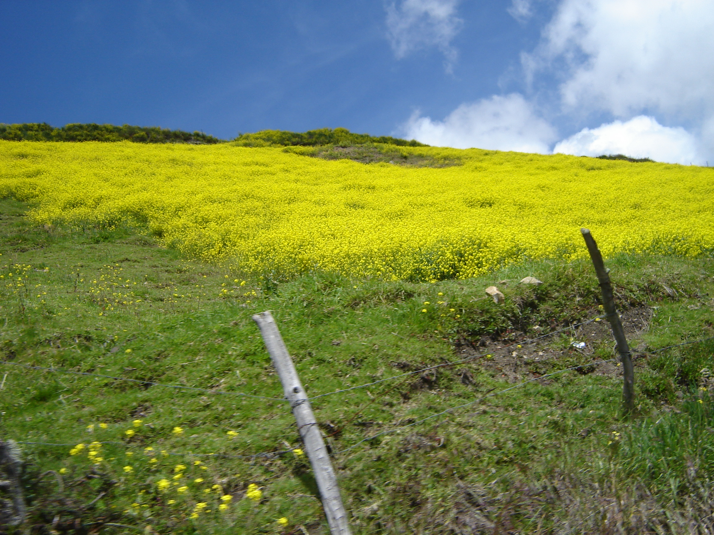 Campos de Flores Amarillas de Merida